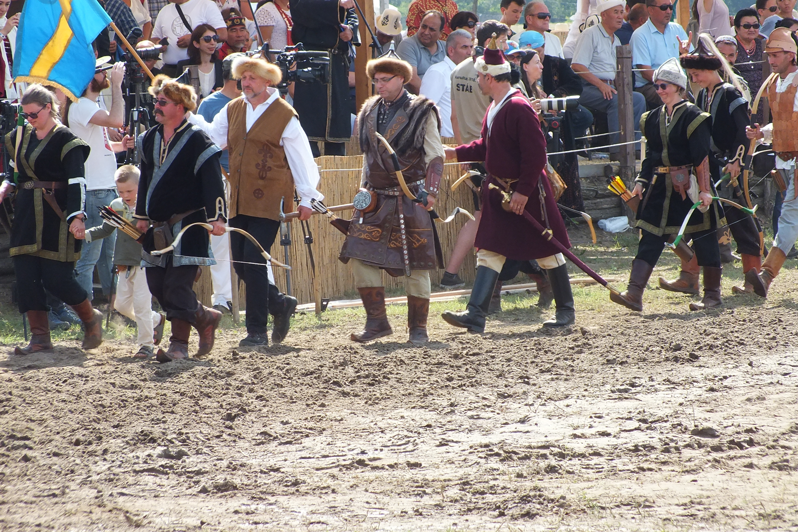 змагання лучників на арені. Курултай 2018 рік. Угорщина